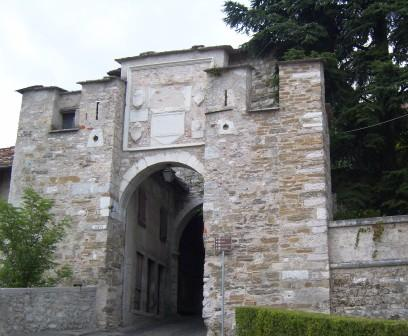 Feltre, Port'Oria